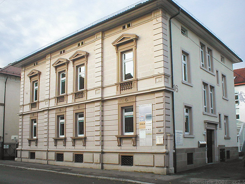 Hist. Anwesen in der Wilhelmstr.16 in Heilbronn